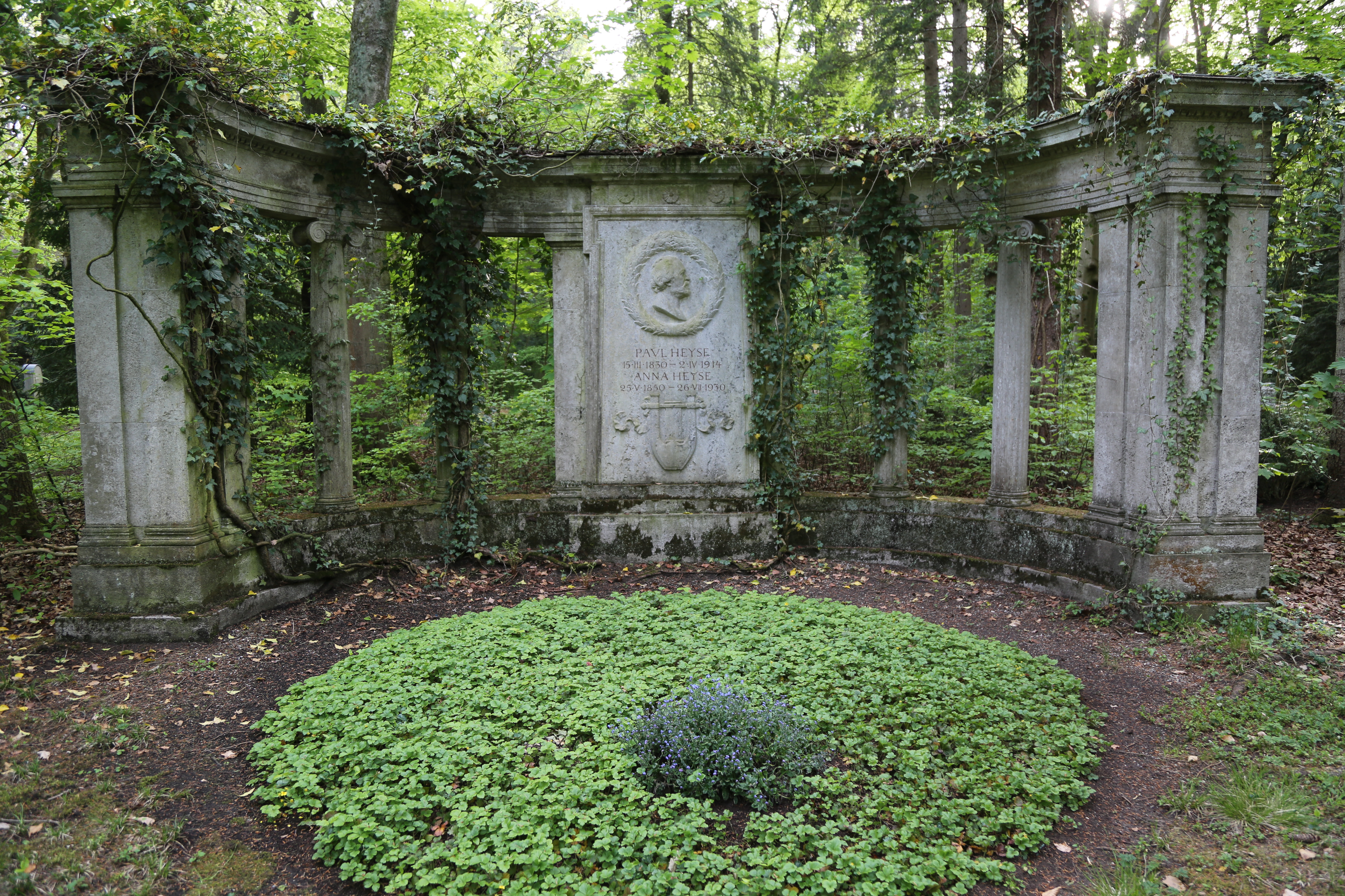 Grabmal von Paul Heyse und Anna Heyse. Waldfriedhof München